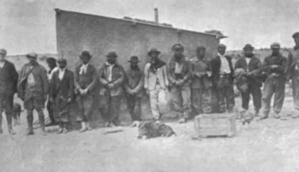 Huelguistas de la columna de Antonio Soto, apresados por las tropas de Varela.